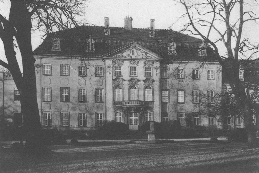 Das Schloss Brandis mit Ansicht der Garteseite aus dem Jahr 1928